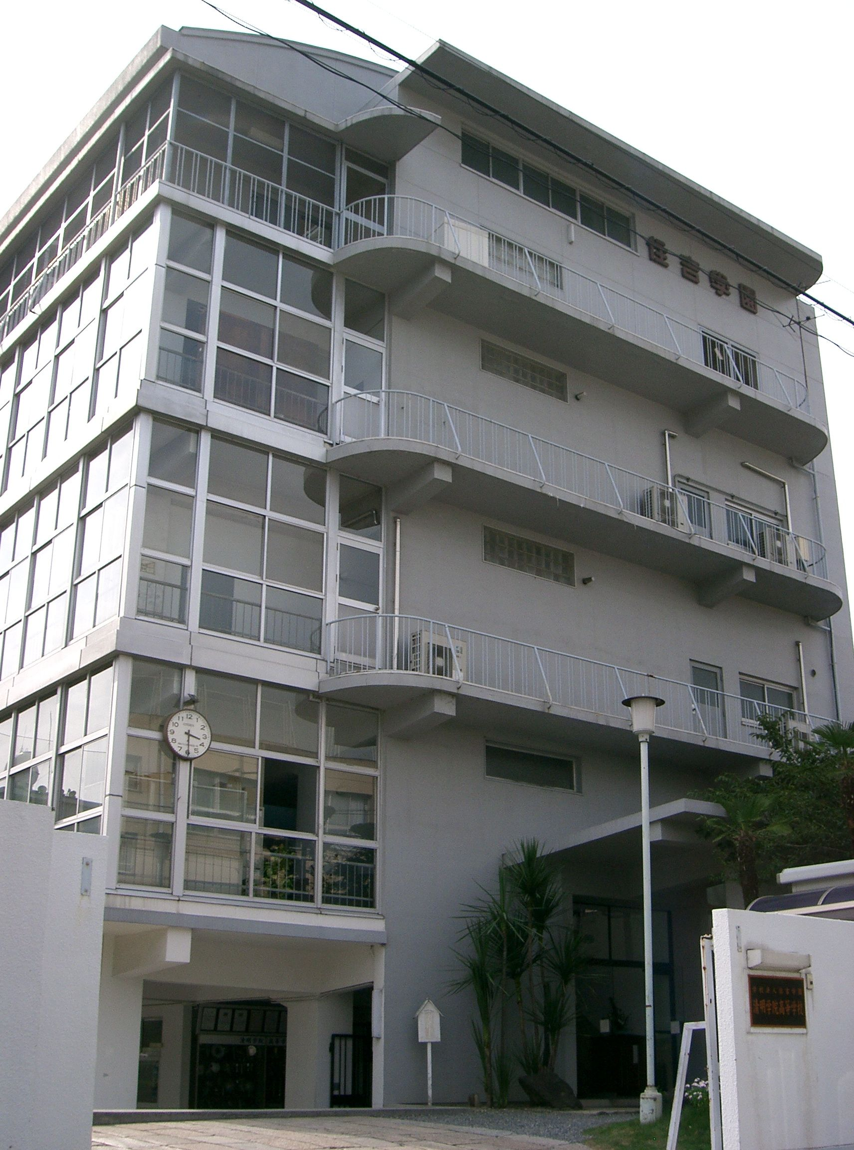 清明学院高等学校